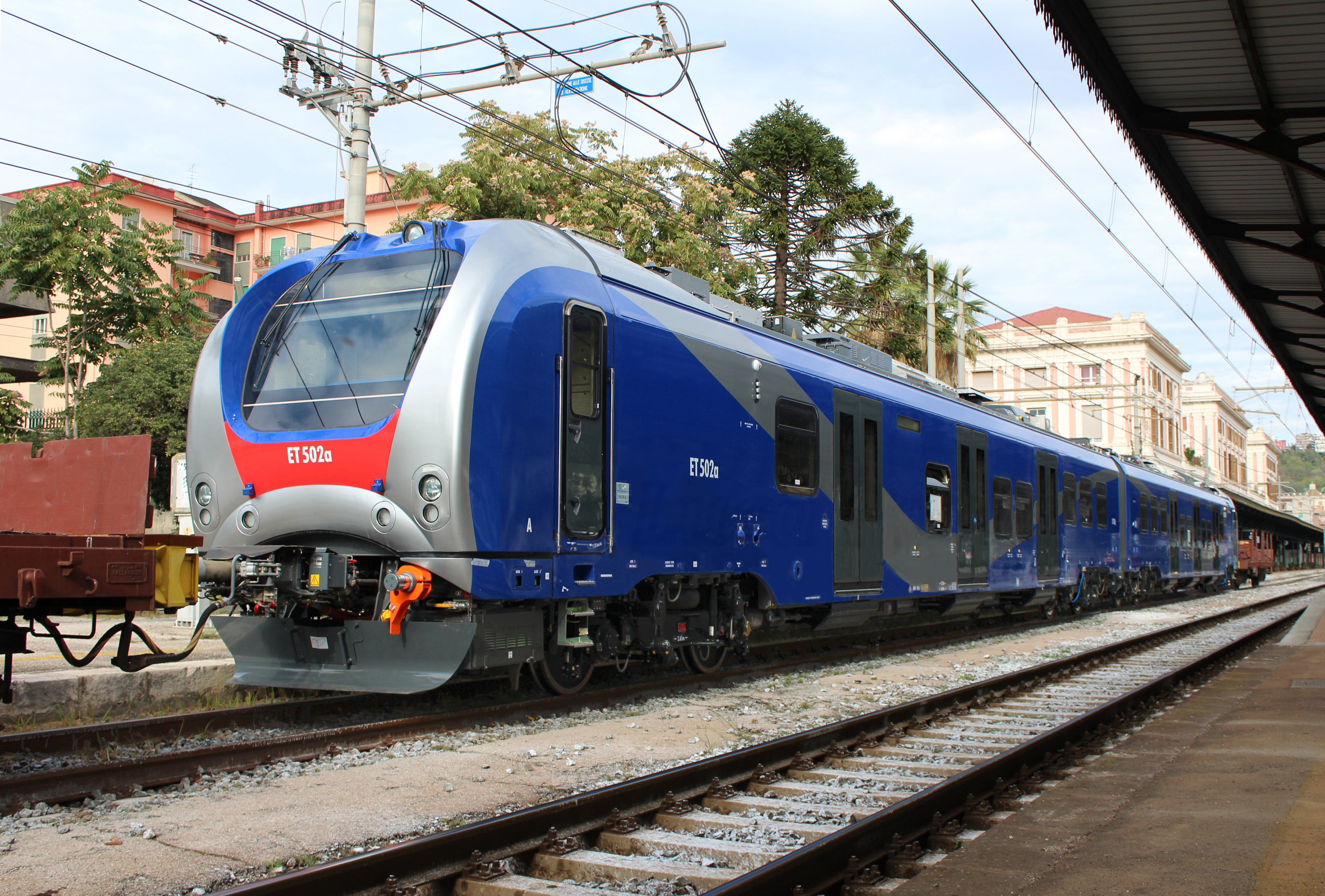 L'Elettrotreno ET.502 "Alfa 3" fresco di fabbrica, proveniente dalla Firema di Caserta. Sarà immesso sui binari della Cumana tramite un raccordo.